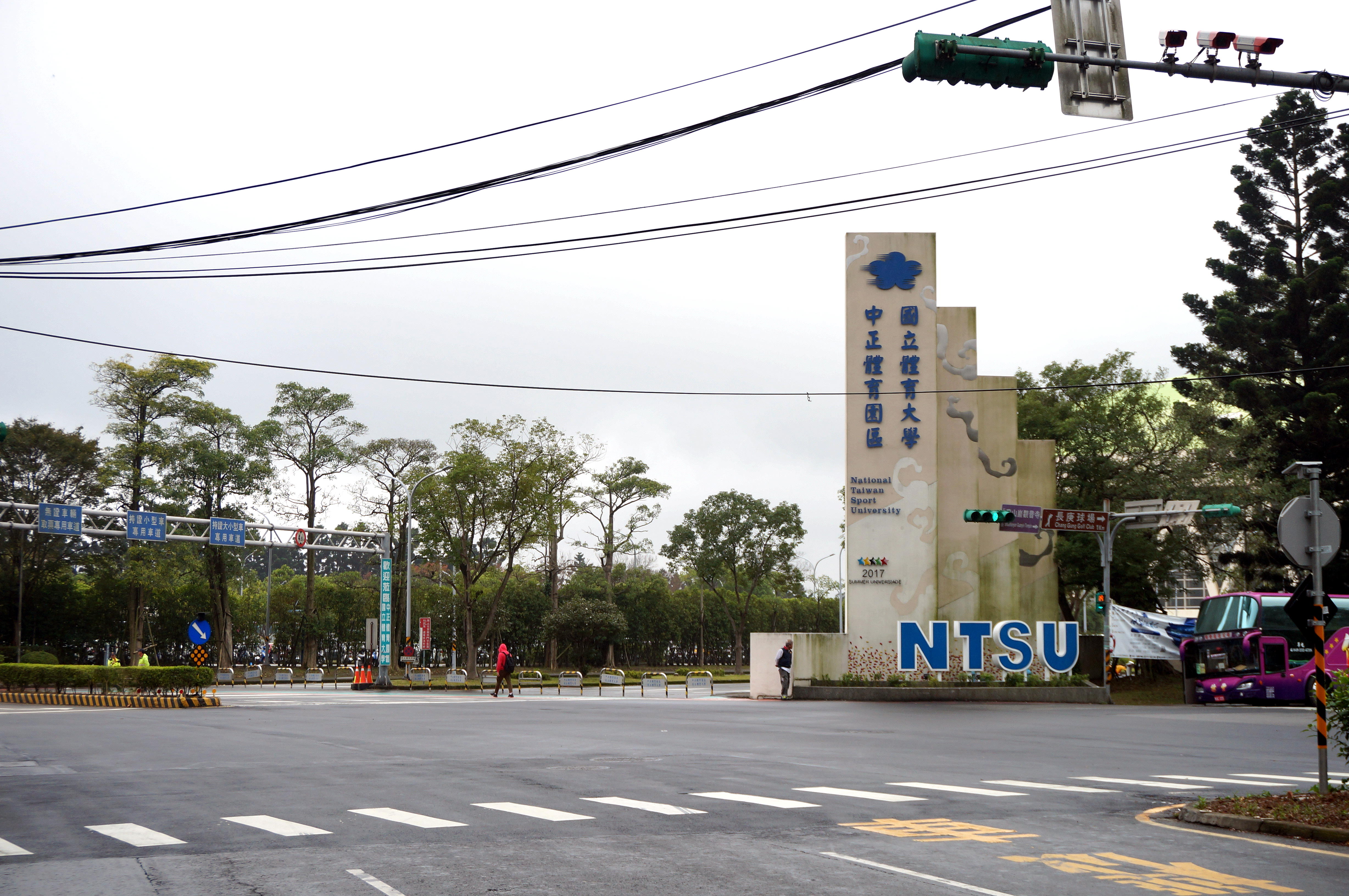 國立體育大學大門，位於桃園市龜山區文化一路。